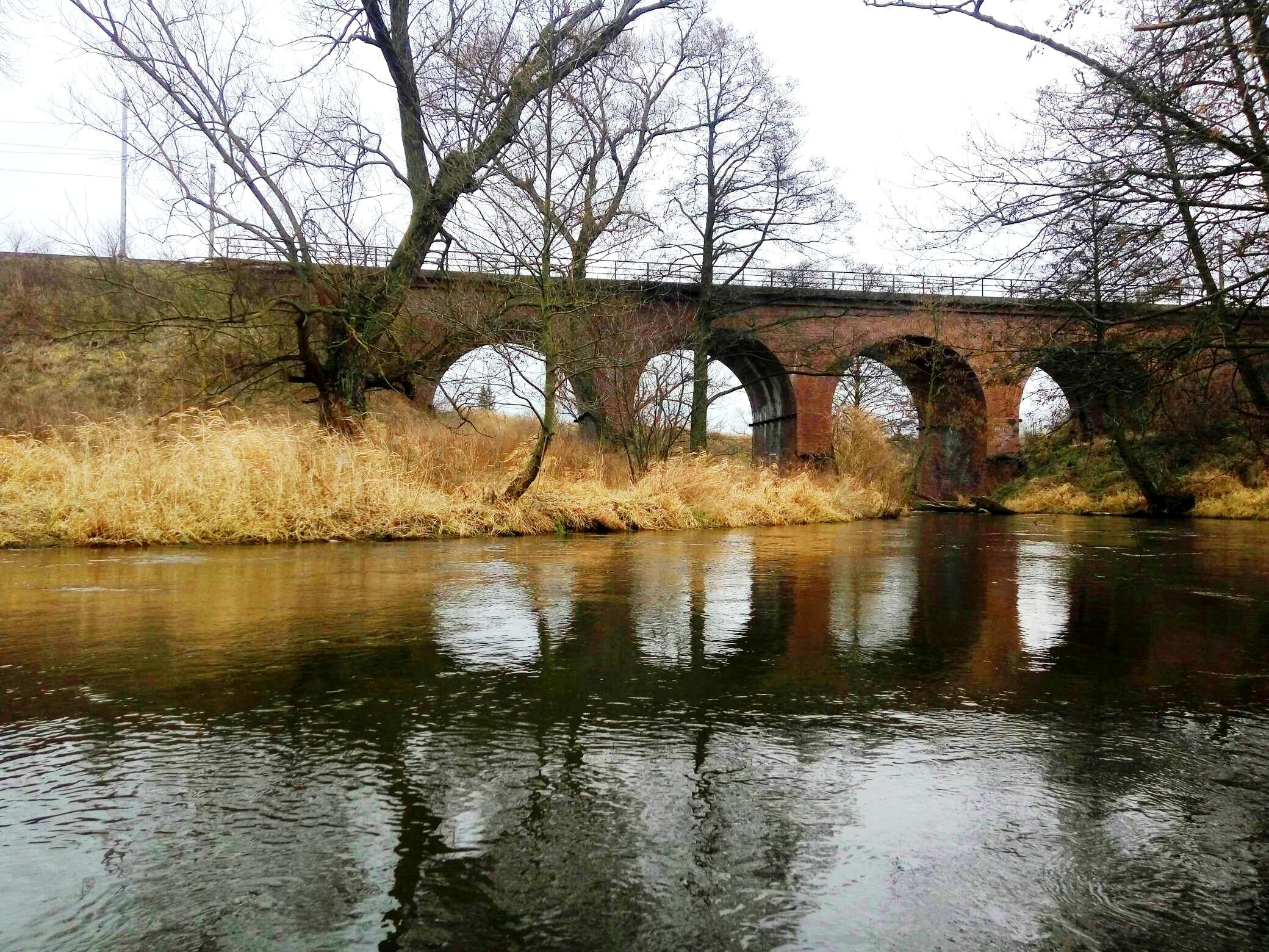 Most Kolejowy w Pelplinie